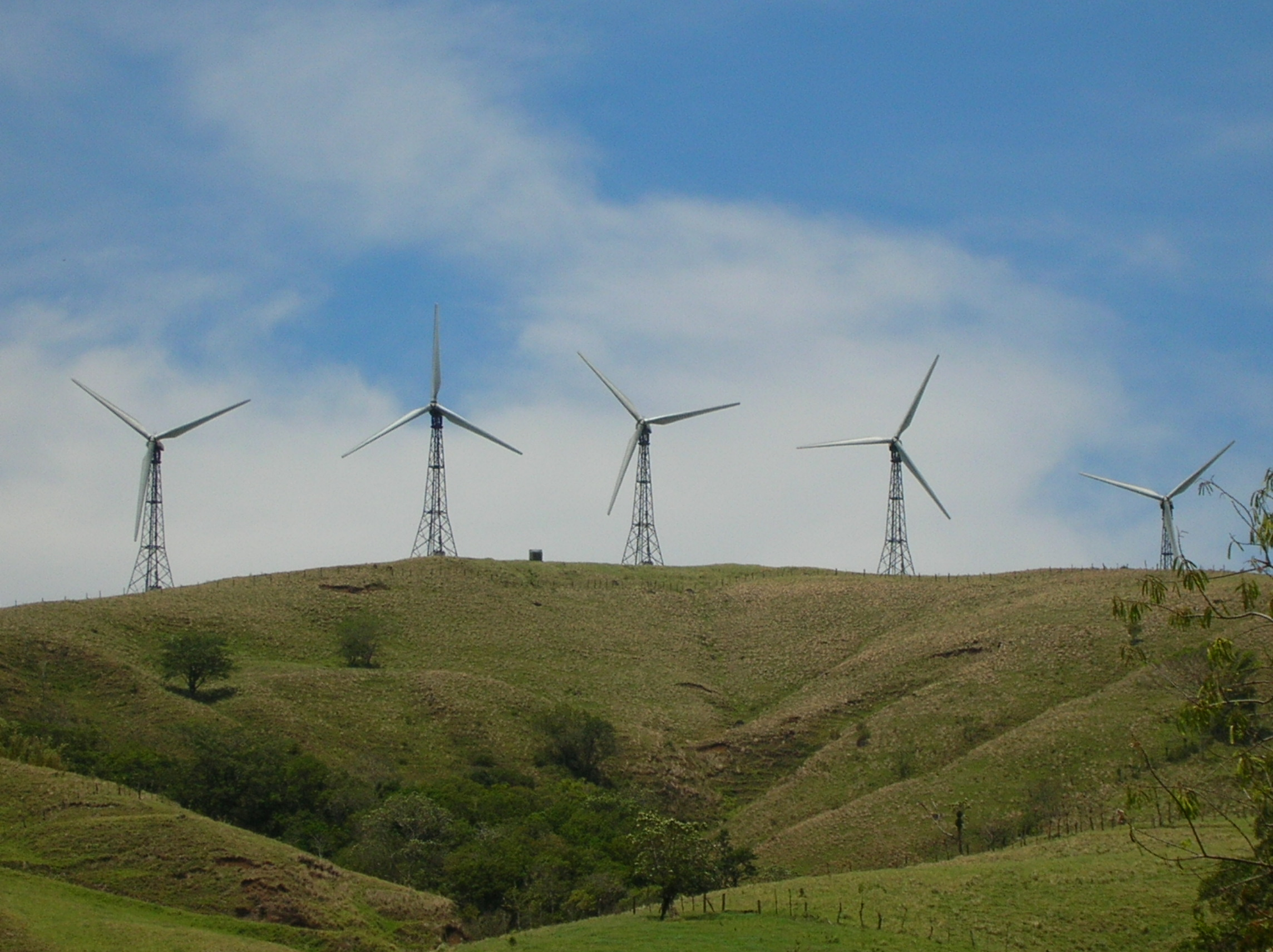 Les éoliennes de Tierras Morenas, au bord du lac Arenal, Costa Rica